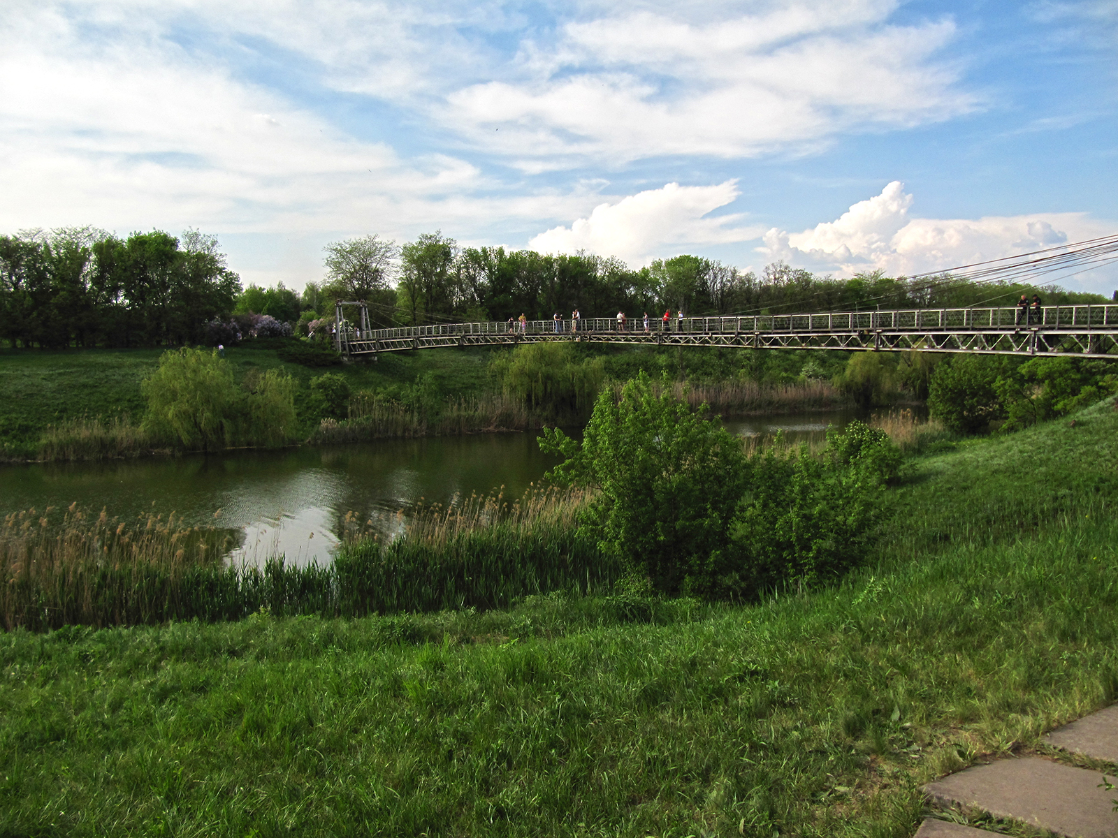 вид на балку та міст з берегу